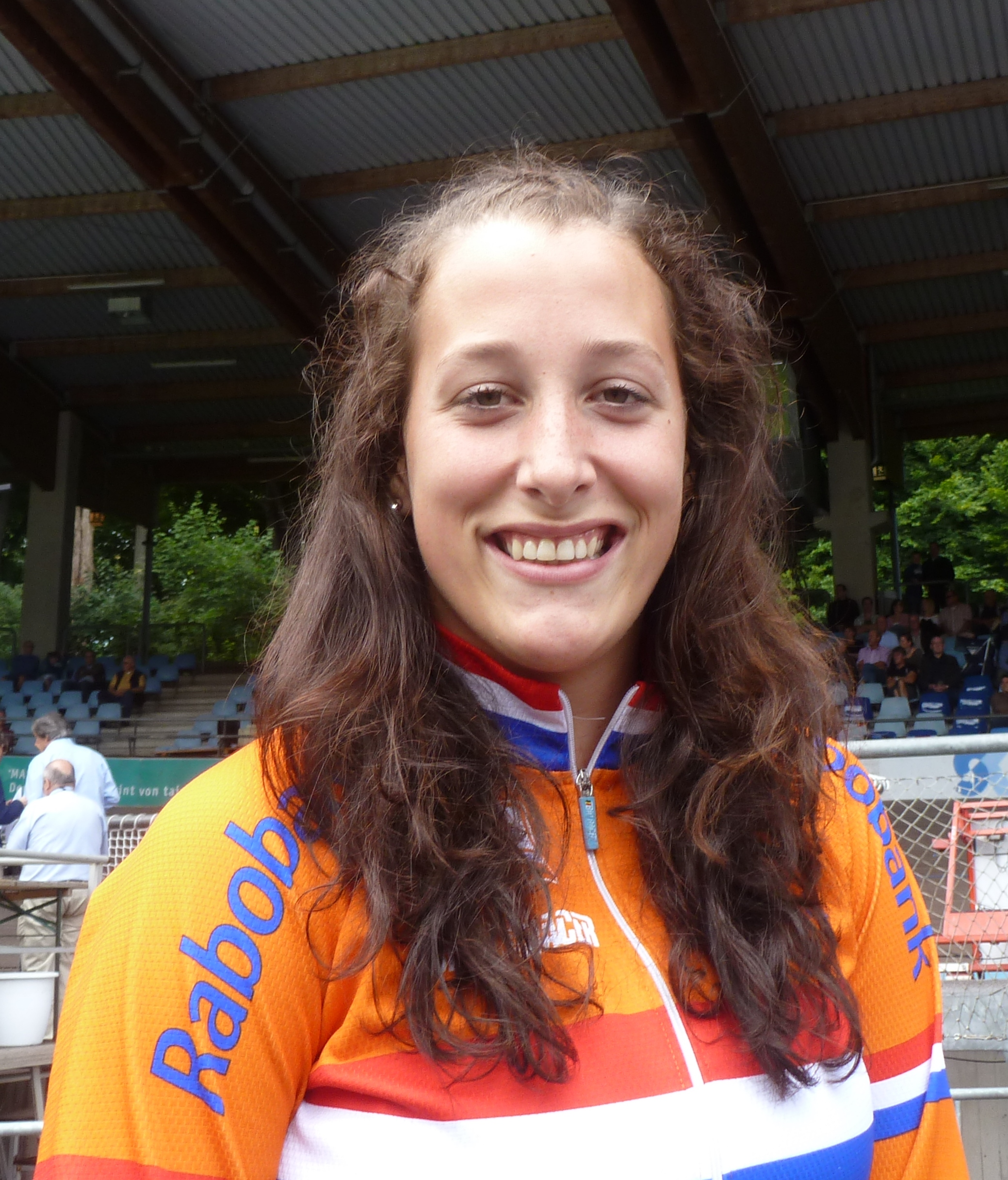 Elis Ligtlee, niederländische Radsportlerin